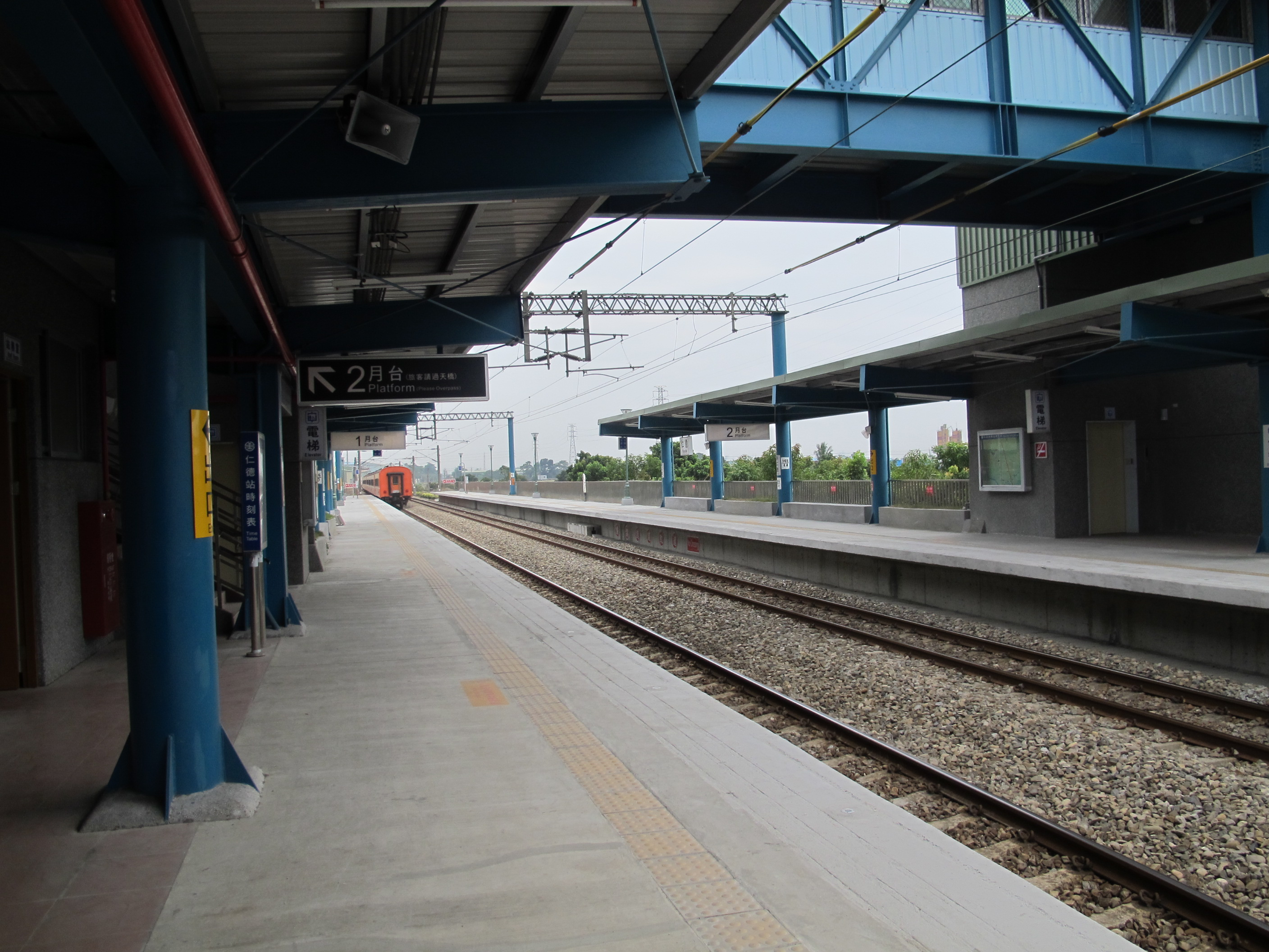 仁德車站站內一景